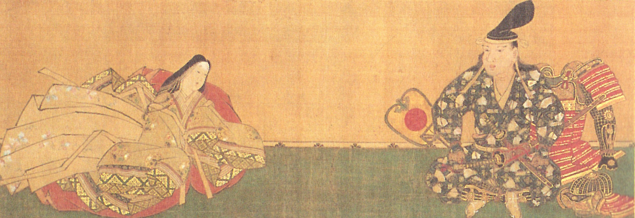 柴田朝意夫妻の肖像。